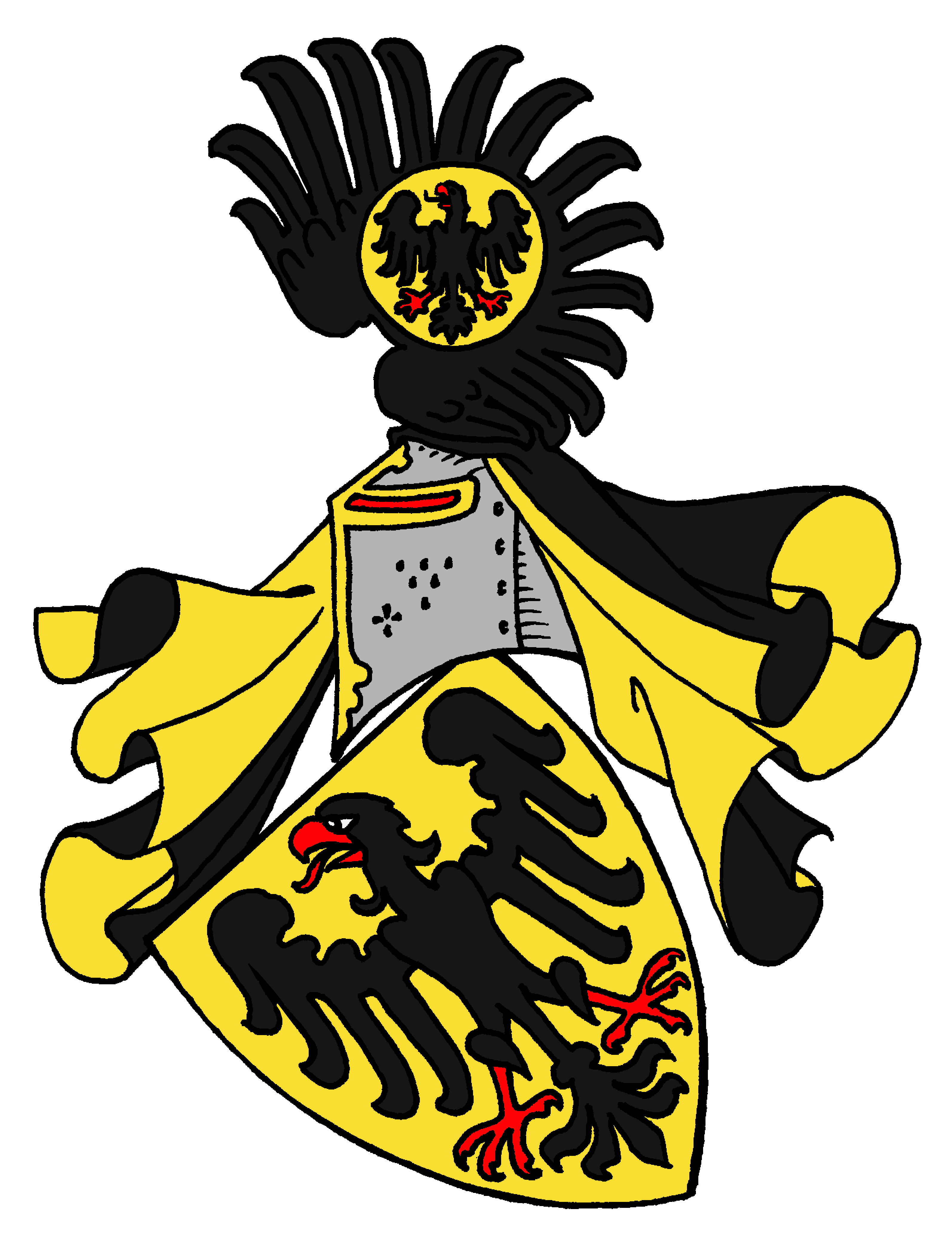 Stammwappen der Grafen von Neuenahr. Graf Otto von Neuenahr 1231. In Gold ein schwarzer Adler mit roter Bewehrung, Helmzier ein schwarzer Flug, belegt mit einer runden Scheibe, auf welcher der Adler wiederholt wird (oder ein wachsender schwarzer Adler), Helmdecke schwarz-golden. 1221 - 1358 herrschten die Grafen von Neuenahr, die um 1220 die bereits 1372 zerstörte Burg Neuenahr erbauten, 1358 - 1425 die Grafen von Neuenahr-Saffenberg, 1425 - 1545 die Grafen von Neuenahr-Saffenberg-Virneburg. 1545 fiel nach dem Aussterben der Grafen von Virneburg die Grafschaft als erledigtes Lehen zurück an den direkten Lehnsherrn, den Herzog von Jülich, der 1545 - 1609 Graf von Neuenahr ist. Im Vertrag von Xanten 1614 fällt die Grafschaft Neuenahr an das Herzogtum Pfalz-Neuburg, 1685-1797 gehörte sie zur Kurpfalz, später kam sie an Preußen.